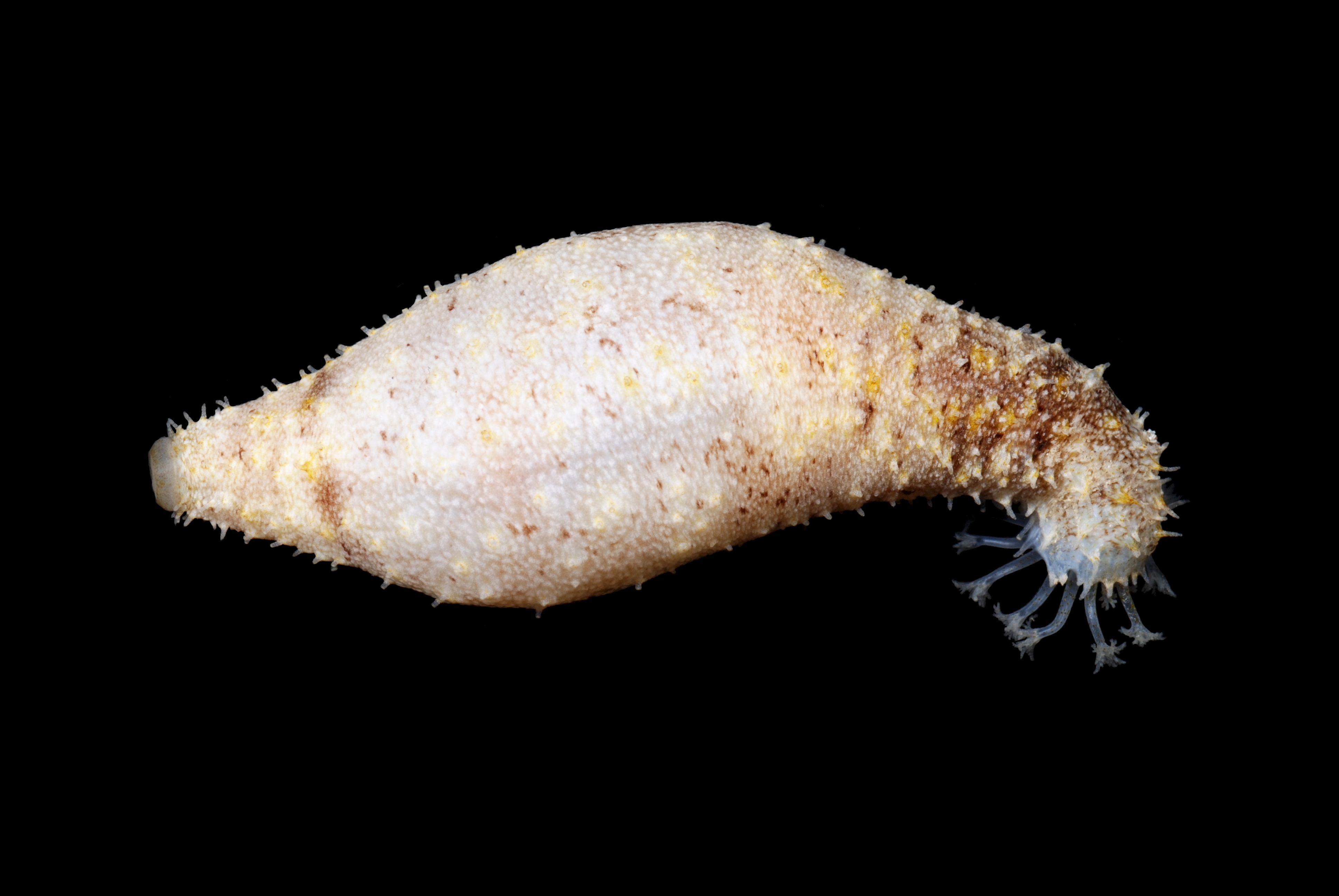 Holothuria lineata. La Réunion.